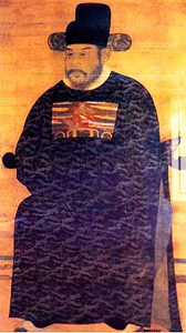 전성부원군 이준 영정